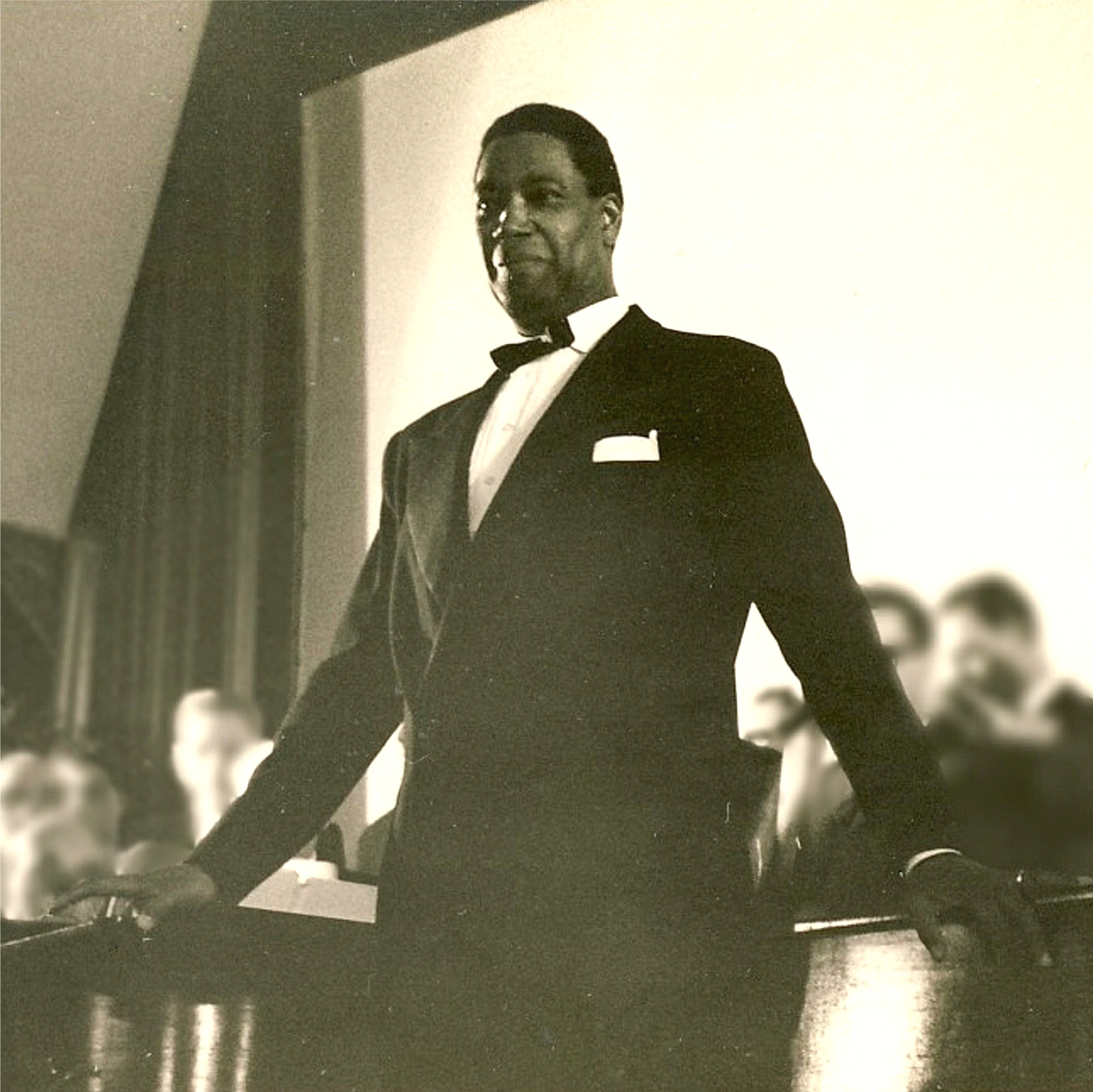 Kenneth Spencer bei einem Konzert in Weißenthurm